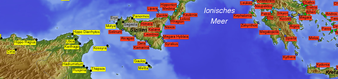 La bildo estas kopiita de de. La originala priskribo estas